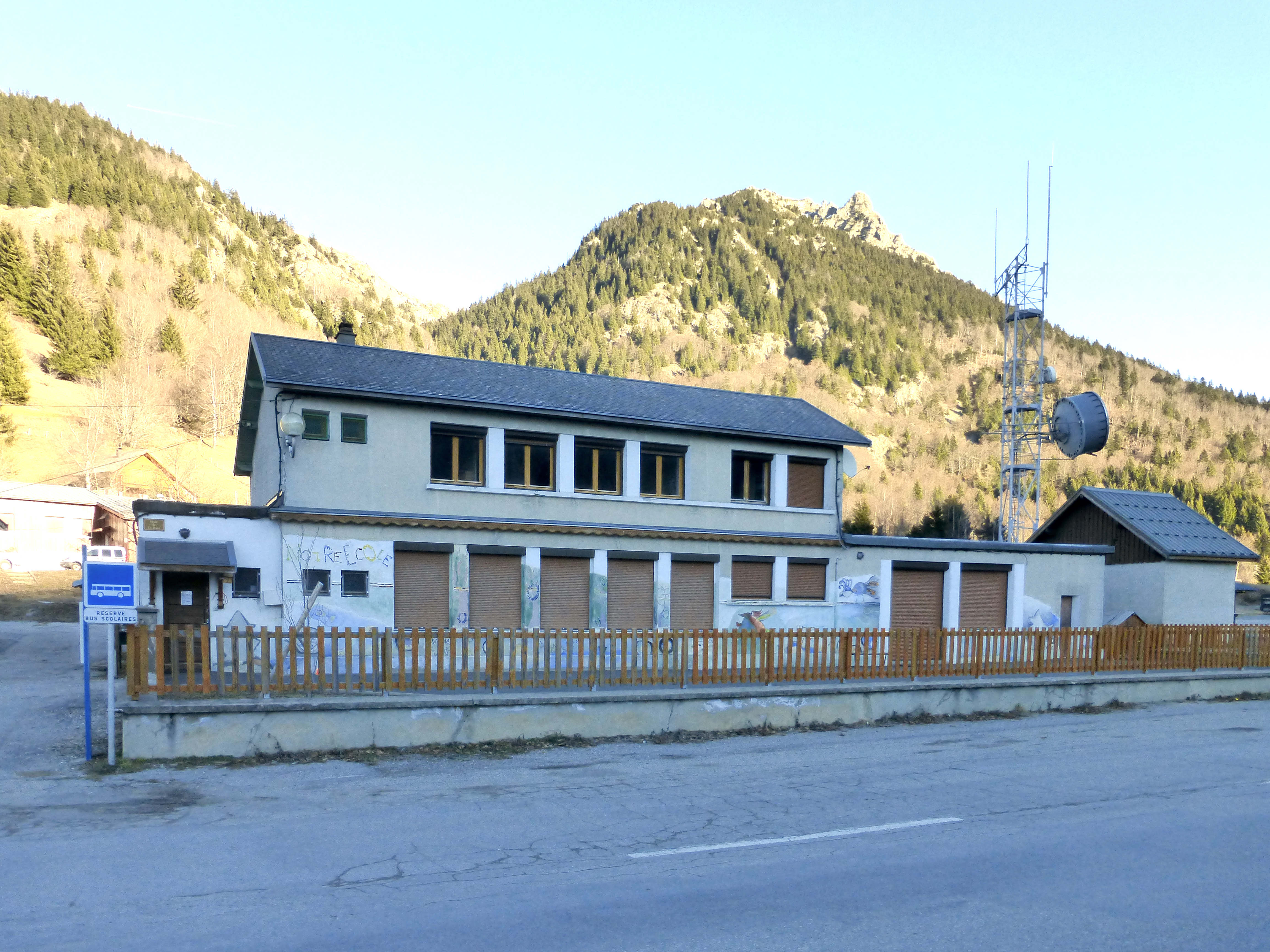 Ecole de La Morte (Isère - France) Décembre 2016